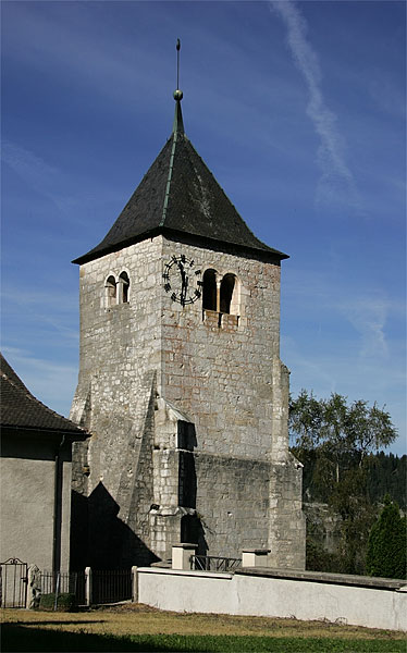 Kirchturm von L'Abbaye im Valée de Joux